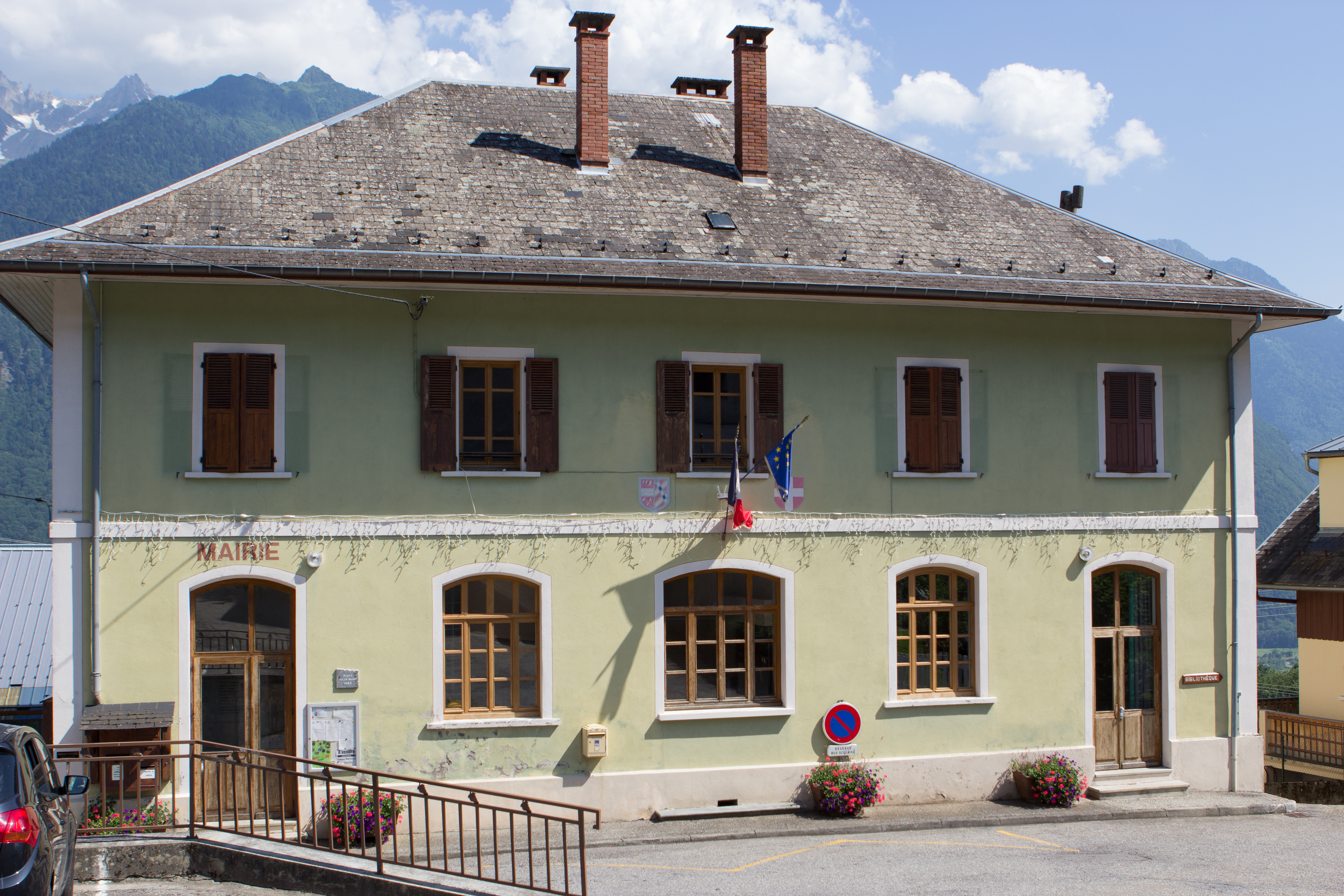 Mairie de Saint-Georges d'Huretières / Saint-Georges d'Huretières, Savoie, France